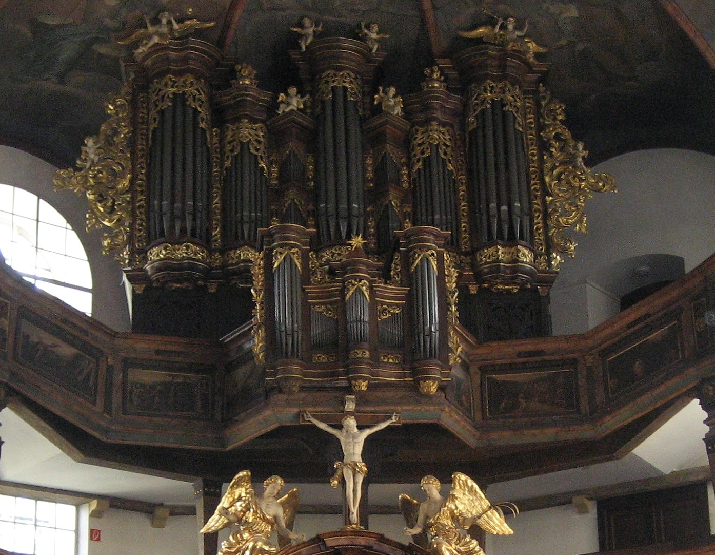 Orgel über dem Altar der Dreifaltigkeitskirche in Speyer, Rheinland-Pfalz.